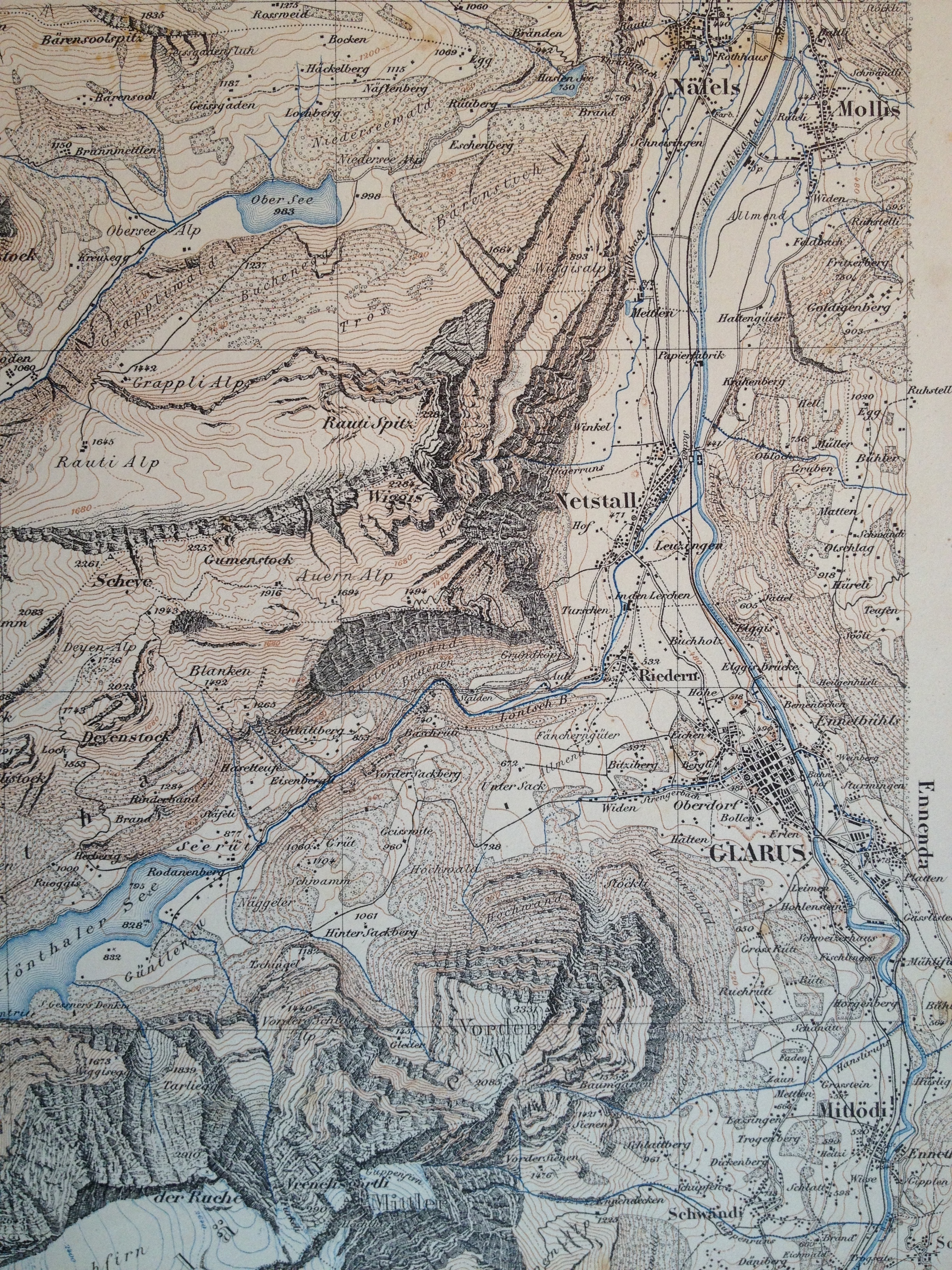 Fragment van blad 263 van de Siegfriedatlas, met daarop de stad Glarus en omgeving.